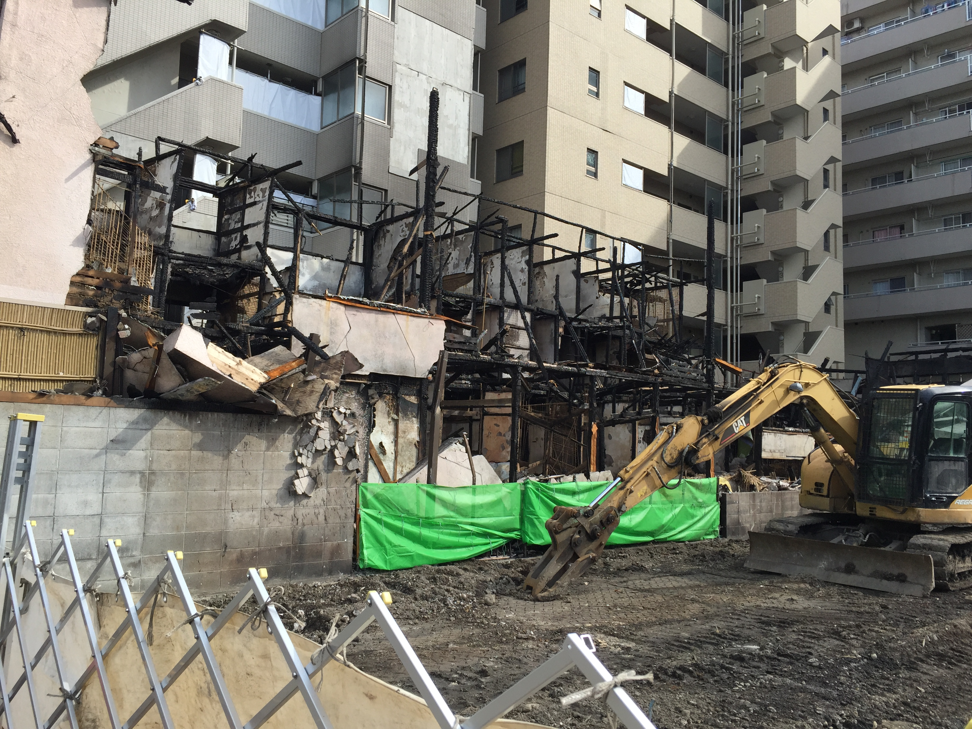 火災後の吉田屋跡（2015年6月7日撮影）